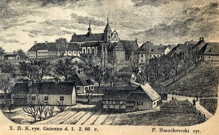 Dziewiętnastowieczna rycina przedstawiająca Wzgórze Panieńskie w Gnieźnie.